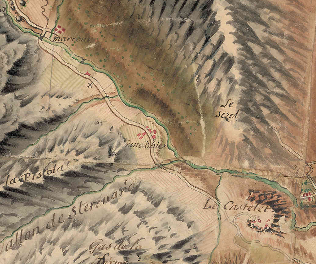 carte de Bourcet numérisé Paris, Nicolas-Alexandre et Olivier-Joseph, Extrait réduc JPG 30% Antoine-H